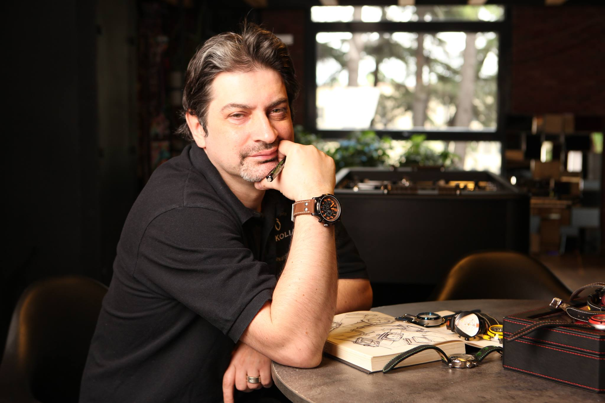 Zviad tsikolia